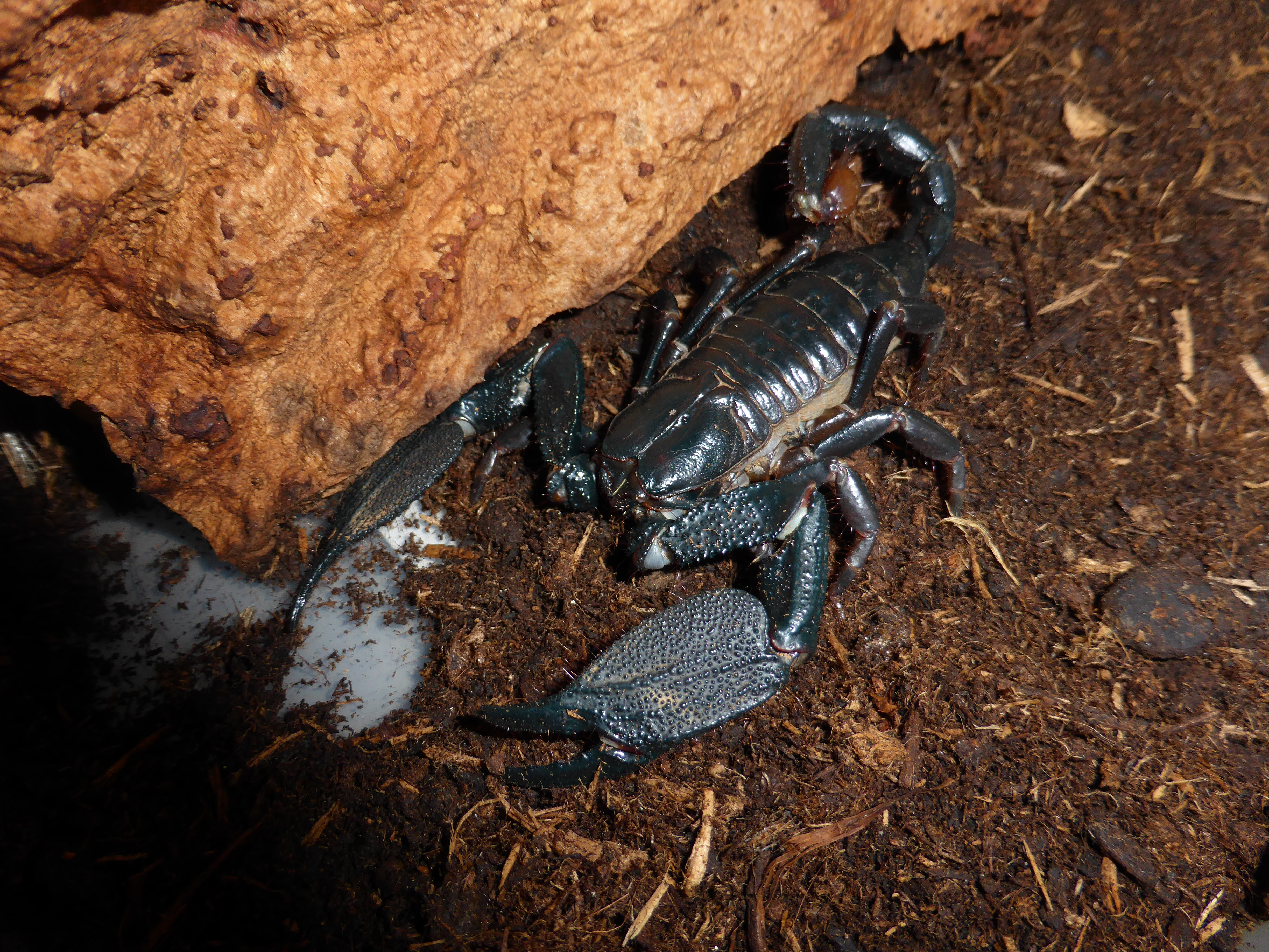 Heterometrus mysorensis, mâle